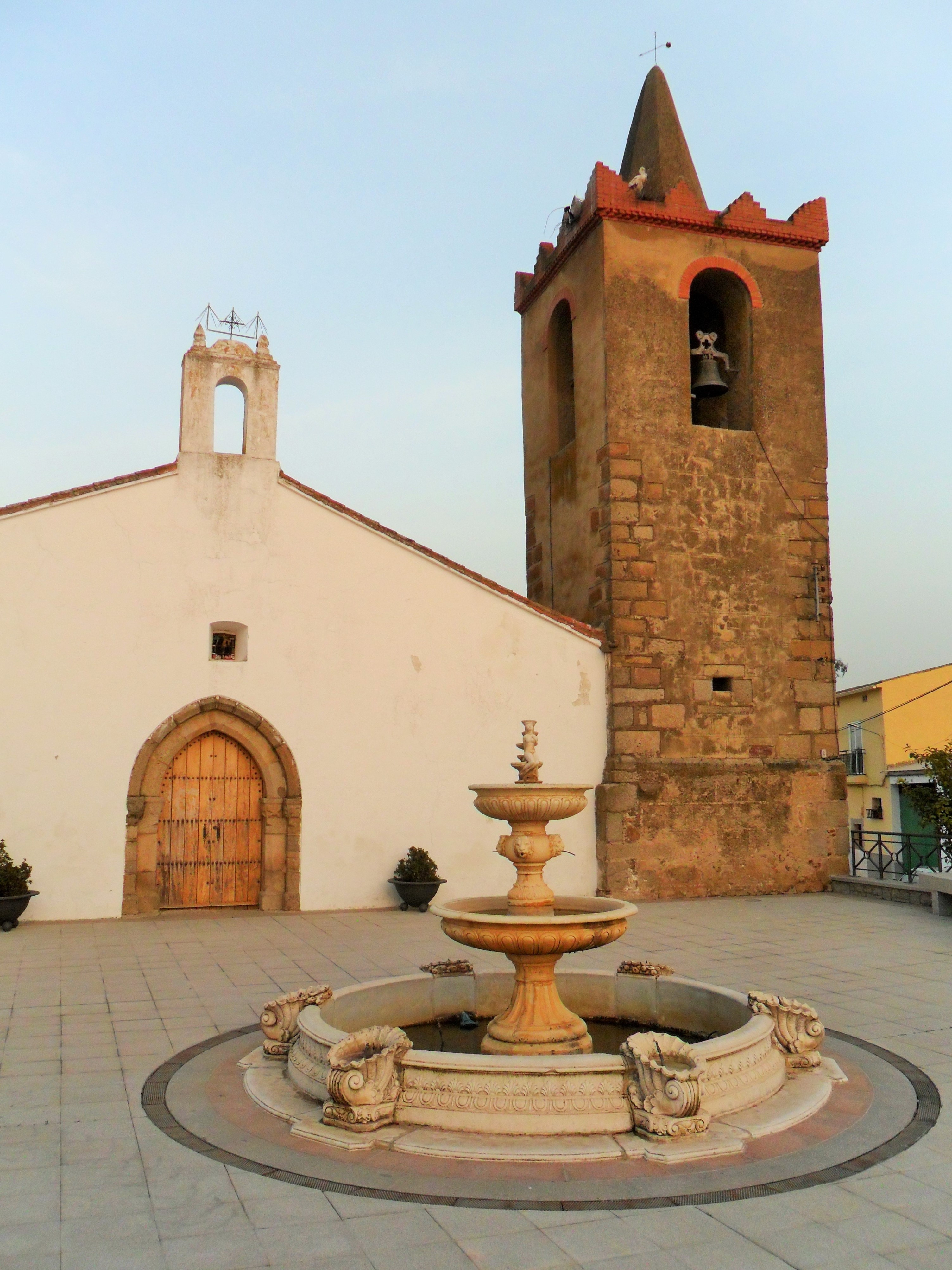 Parroquia de Nuestra Señora de los Ángeles.